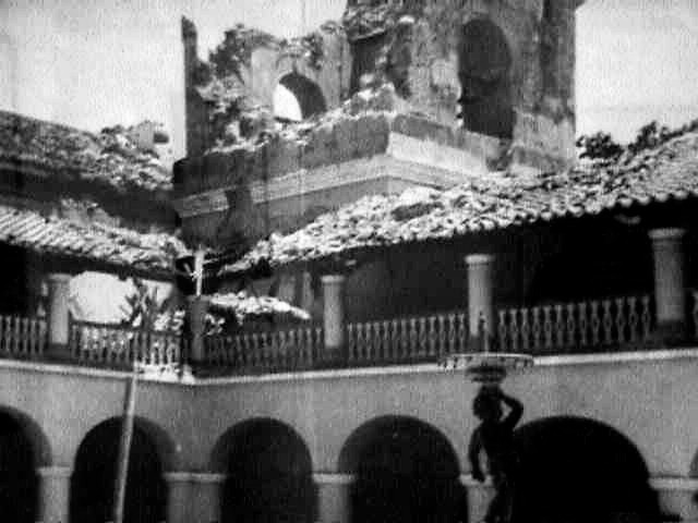 Antigua Torre de la Catedral El Tocuyo, Estado Lara (Venezuela) después del terremoto de 1950.